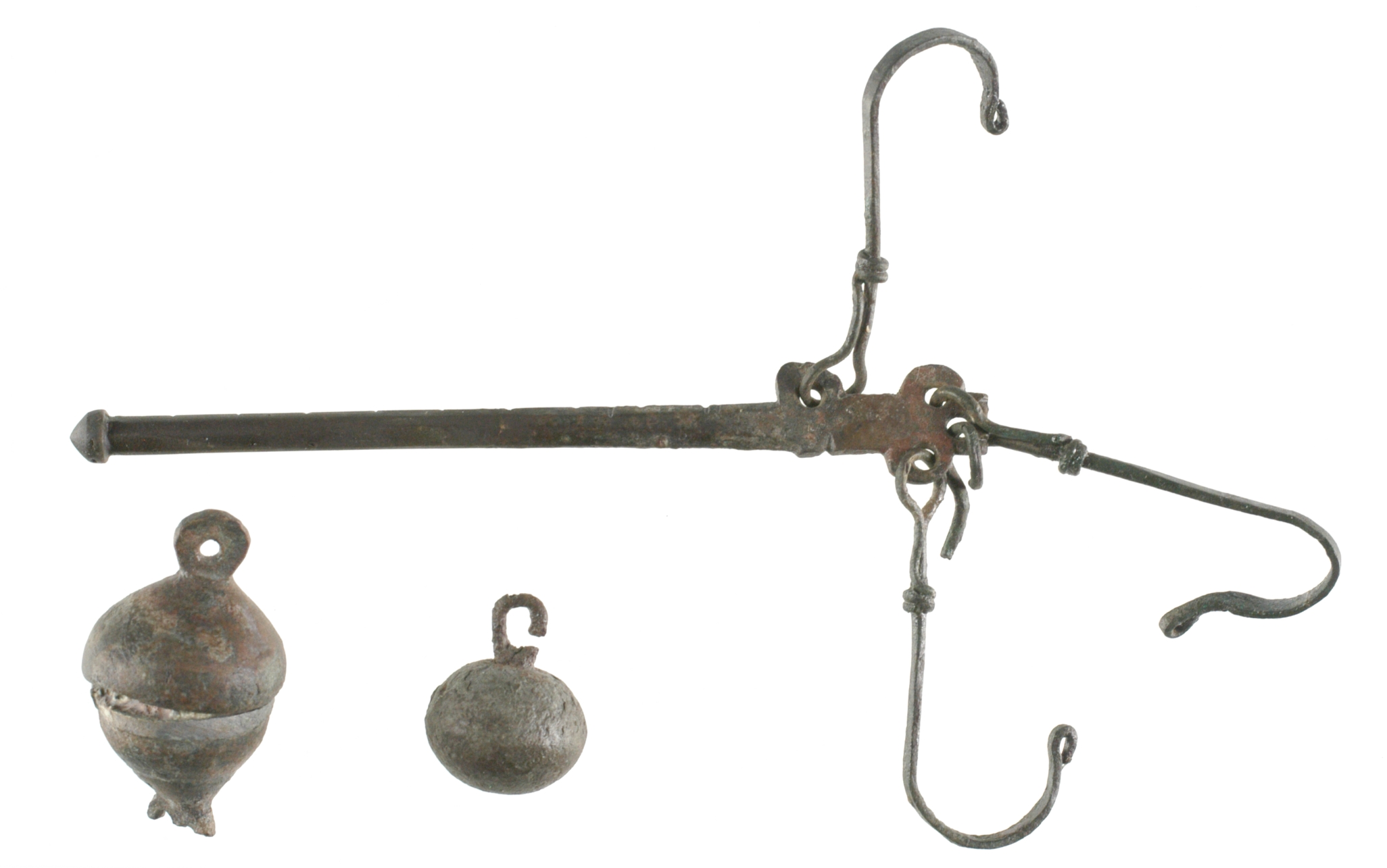 Weegschaal (unster) met 2 gewichten in brons, 50 tot 200 NC, vindplaats: Onbekend, collectie Gallo-Romeins Museum Tongeren, GRM 48